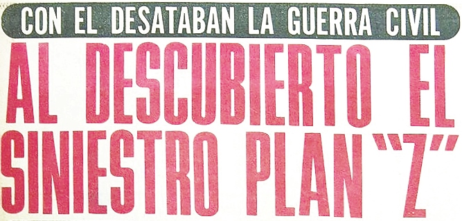 Portada del Diario La Tercera del 22 de septiembre de 1973: "Con el desataban la guerra civil. Al descubierto el siniestro Plan "Z".